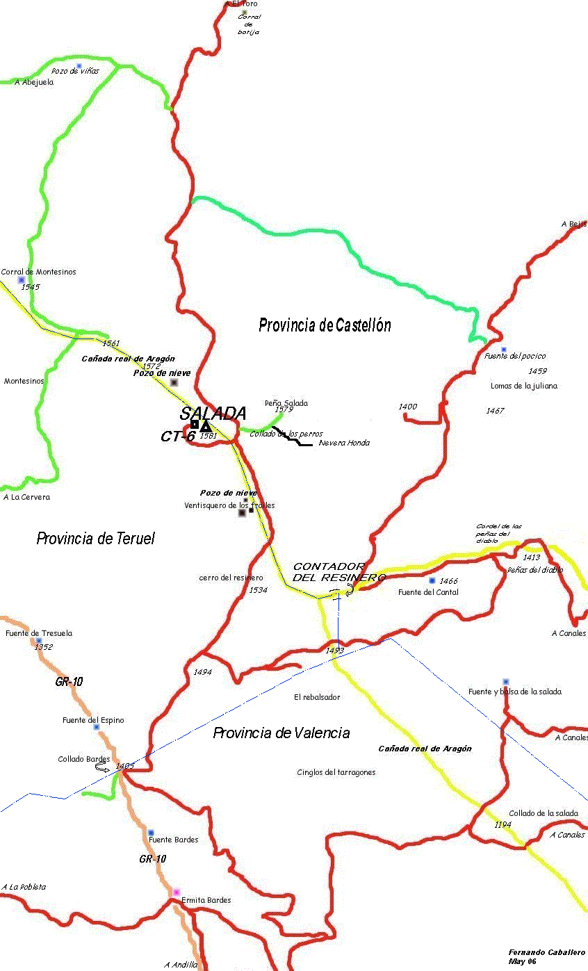 Mapa esquematico de La Salada y de sus alrededores.